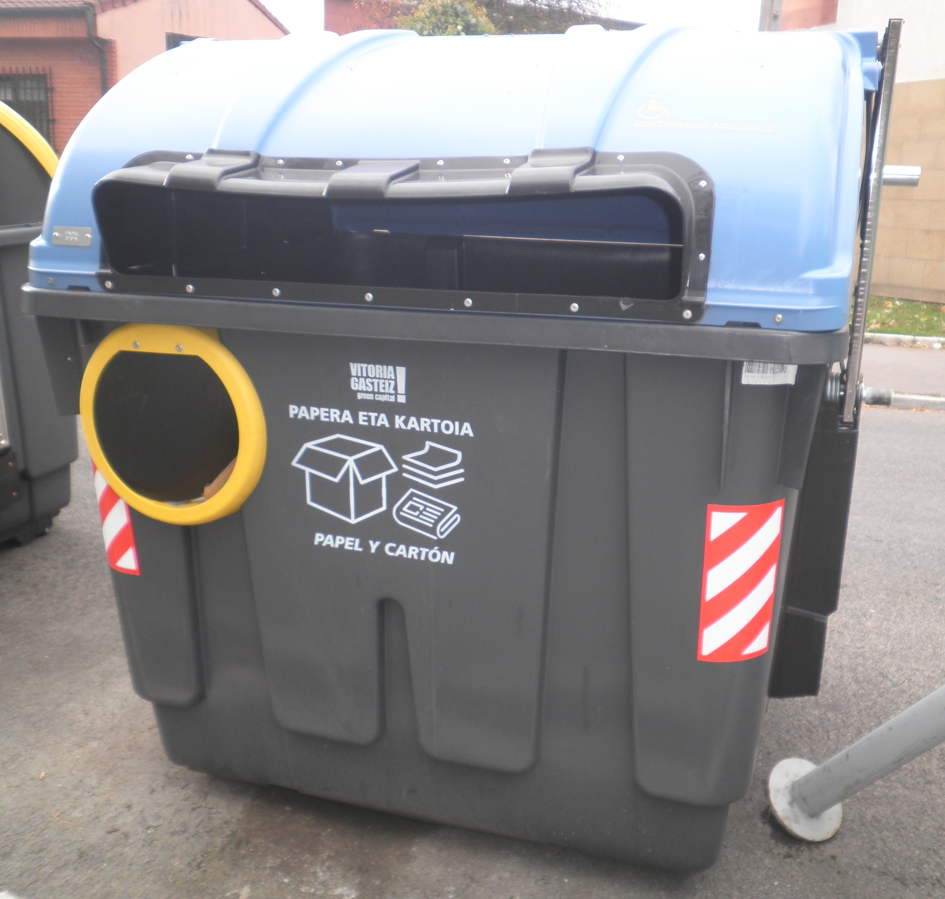 Contenur Gasteiz